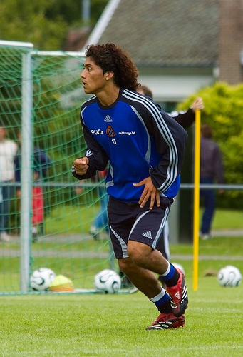 Foto van Daniël Chavez, Club Brugge.